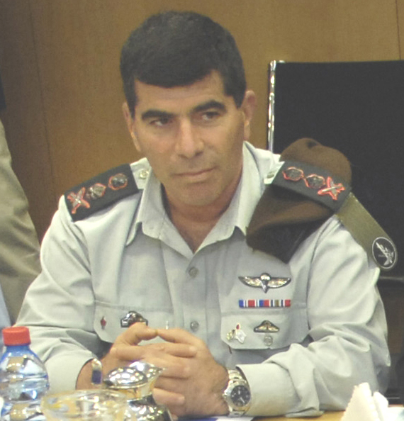 Gabi Ashkenazi